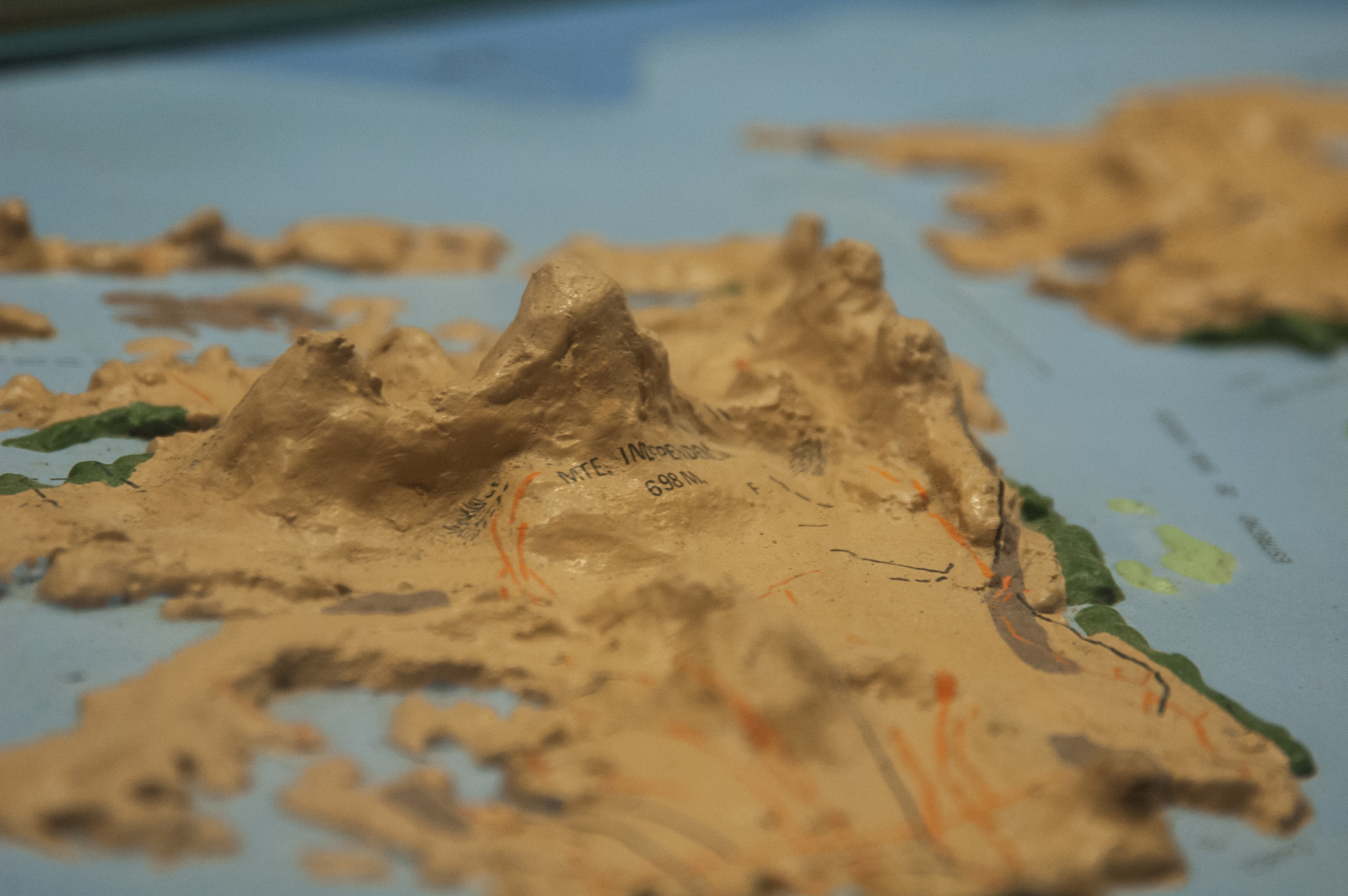 museo malvinas 025 relieve